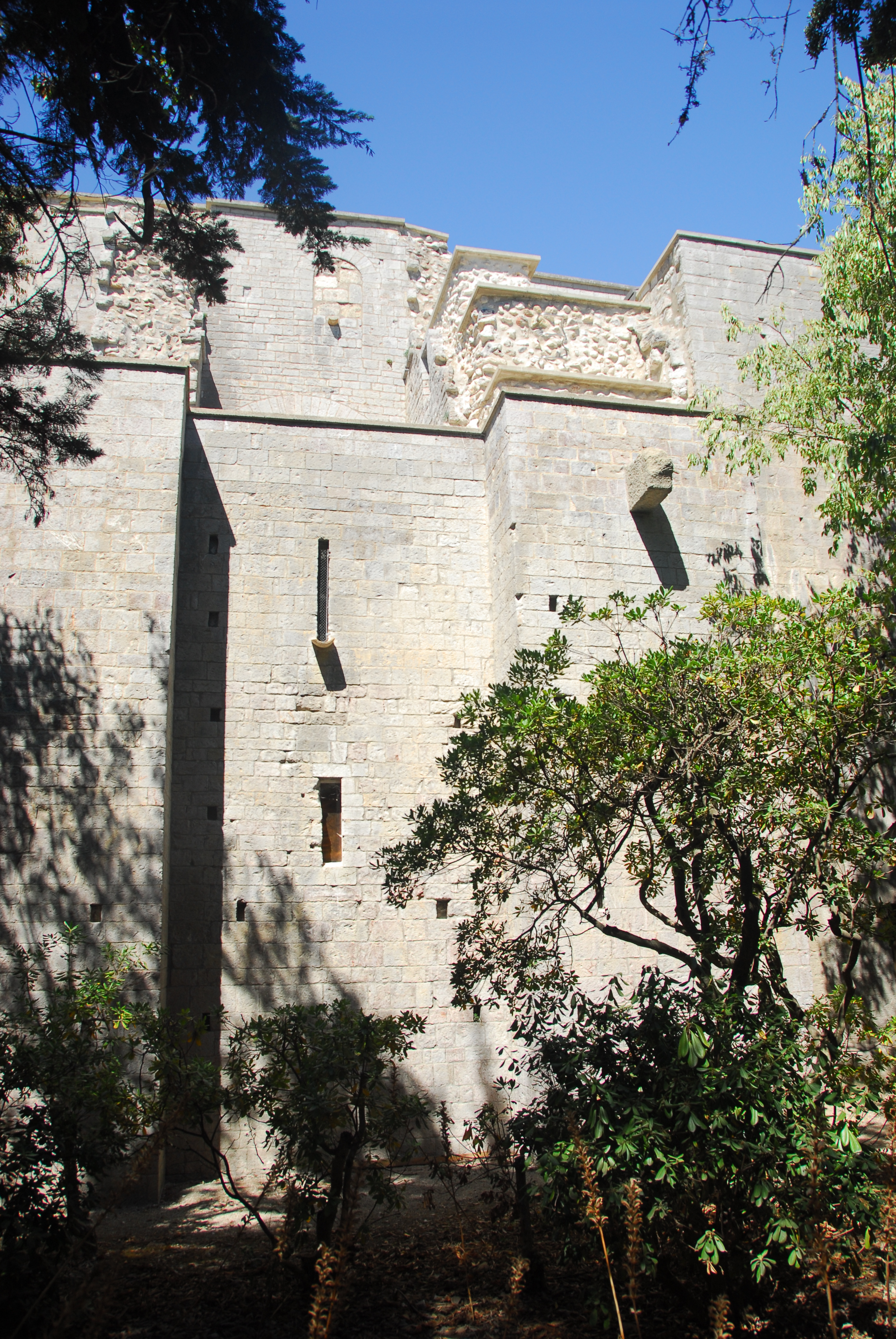 St-Pierre-et-St-Paul de Maguelone, St-Augustin-turm von S